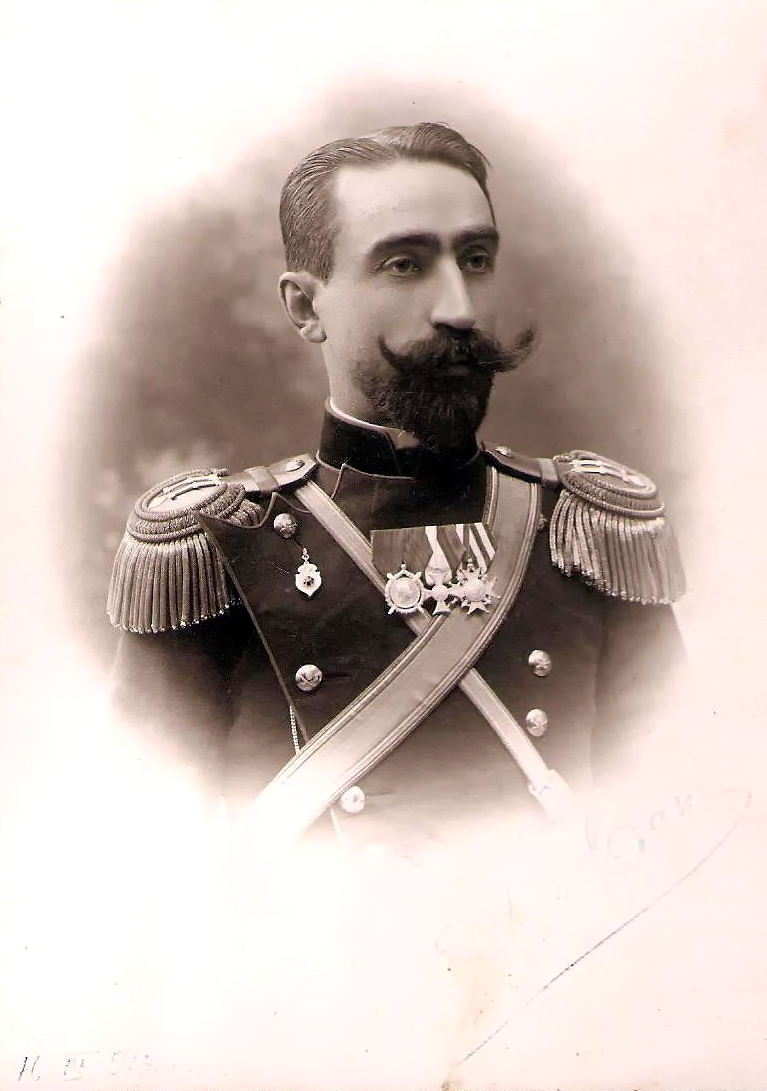 Генерал Първан Първанов